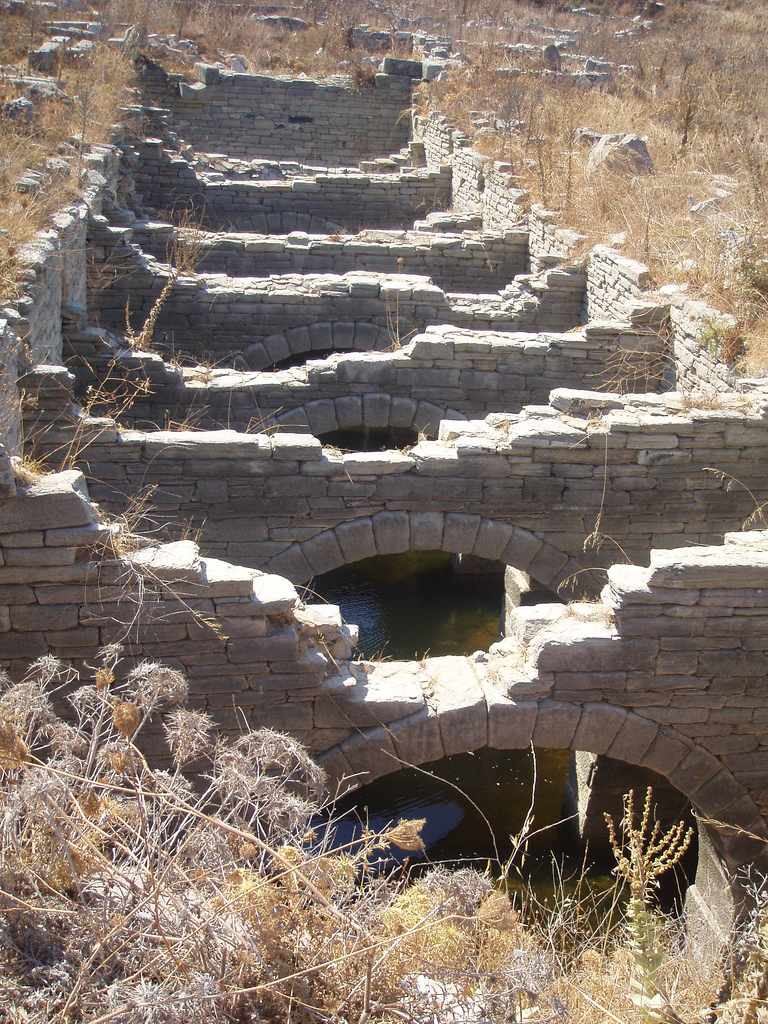 Citerne du théâtre. Les citernes étaint très nombreuses à Délos, car l'île est dépourvue de sources.